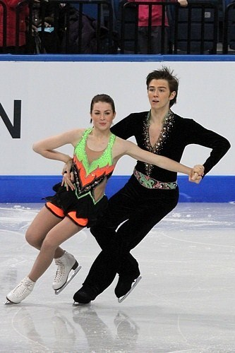 Оливия Самарт и Джозеф Бакленд (Великобритания) на чемпионате мира по фигурному катанию среди юниоров 2012